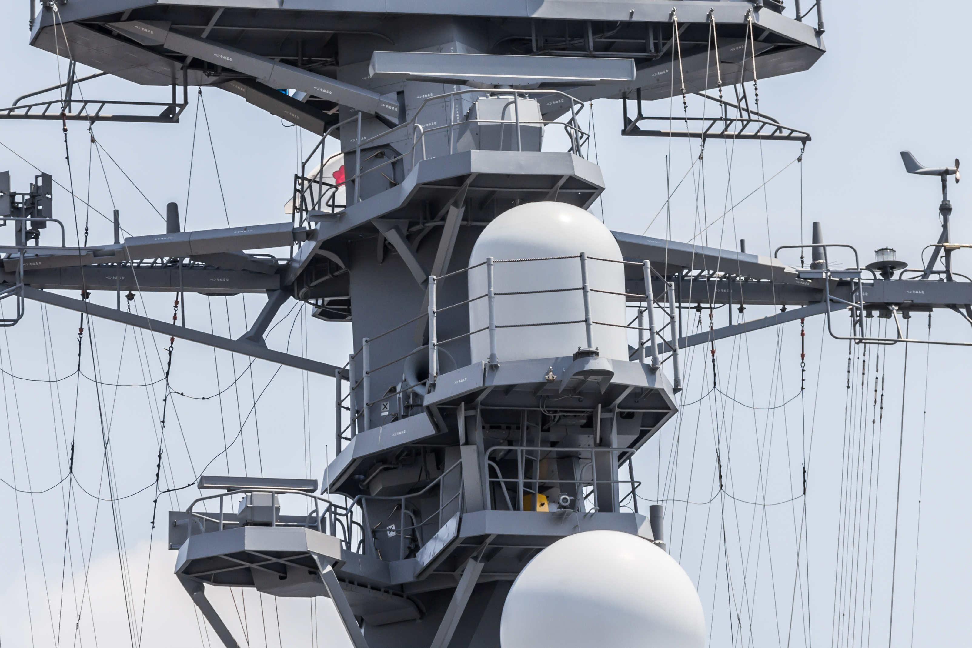 Radar antennas on JS Akizuki (DD-115) at Nagoya (2013 August 4th)